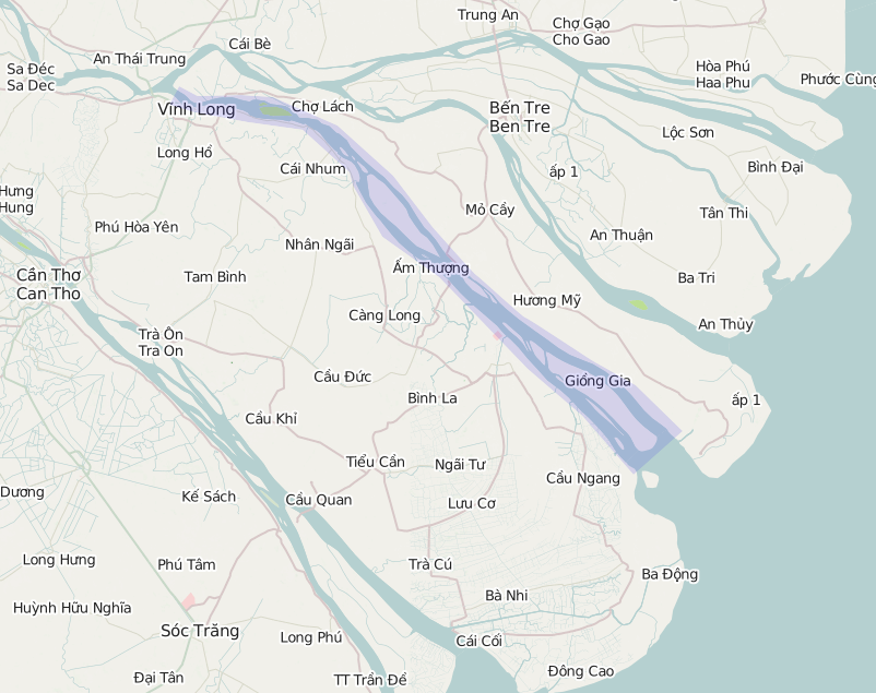 メコンデルタ地域におけるコーチェン川の流域をOpenStreetMap上に加筆 *地図:OpenStreetMap, 2015-09-03時点. This map may be incomplete, and may contain errors. Don't rely solely on it for navigation.